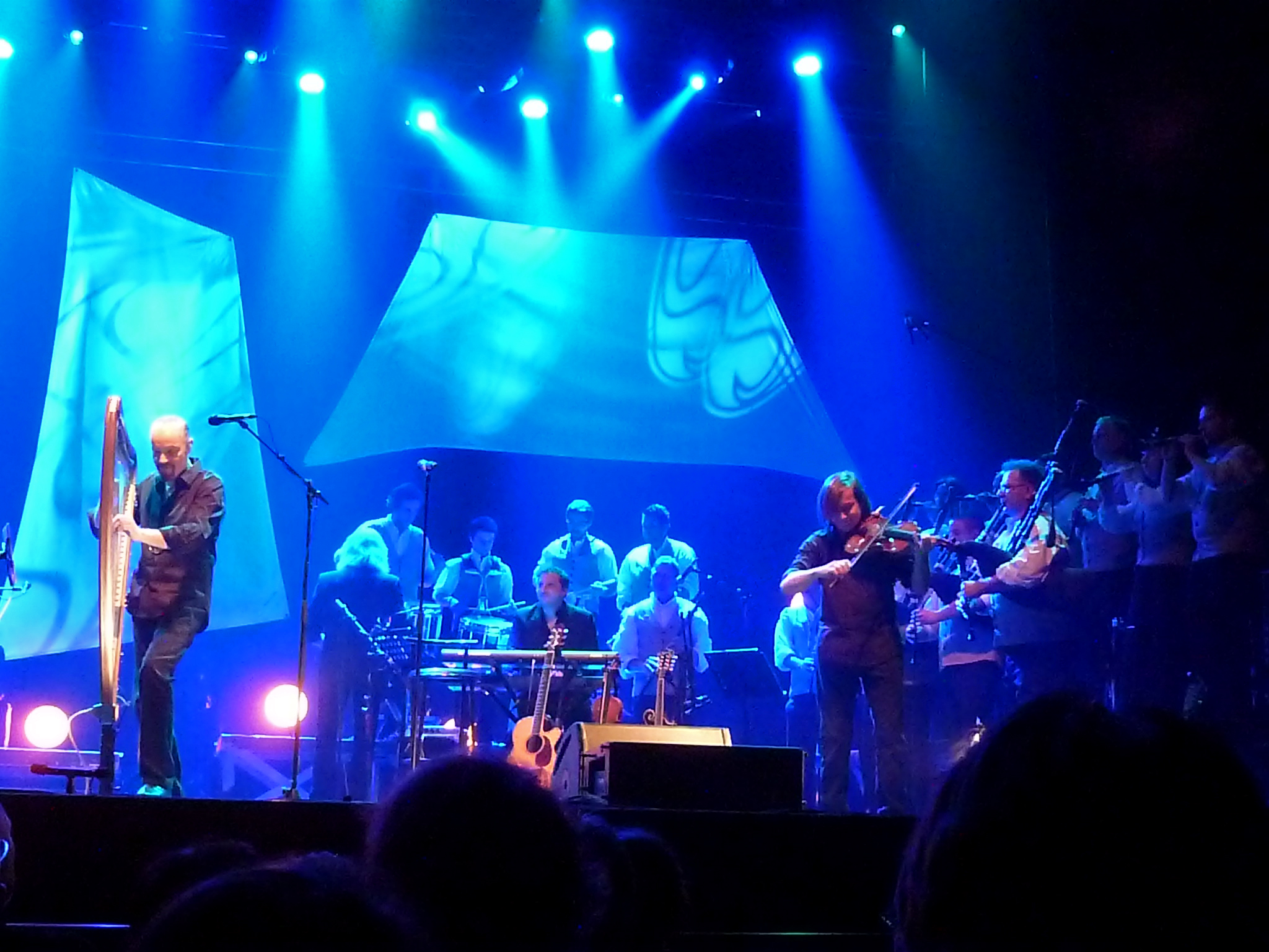 Alan Stivell à l'Olympia (Paris) le 16 février 2012 pour son concert anniversaire, accompagné de ses musiciens et du bagad Quic-en-Groigne, de Saint-Malo, avec la direction artistique de Robert Le Gall.